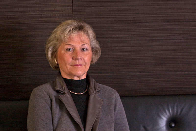 Landtagsabgeordnete Niedersachsen, 16. Wahlperiode (Fotoprojekt Landtagsabgeordnete Niedersachsen am 24. und 25. November 2009)